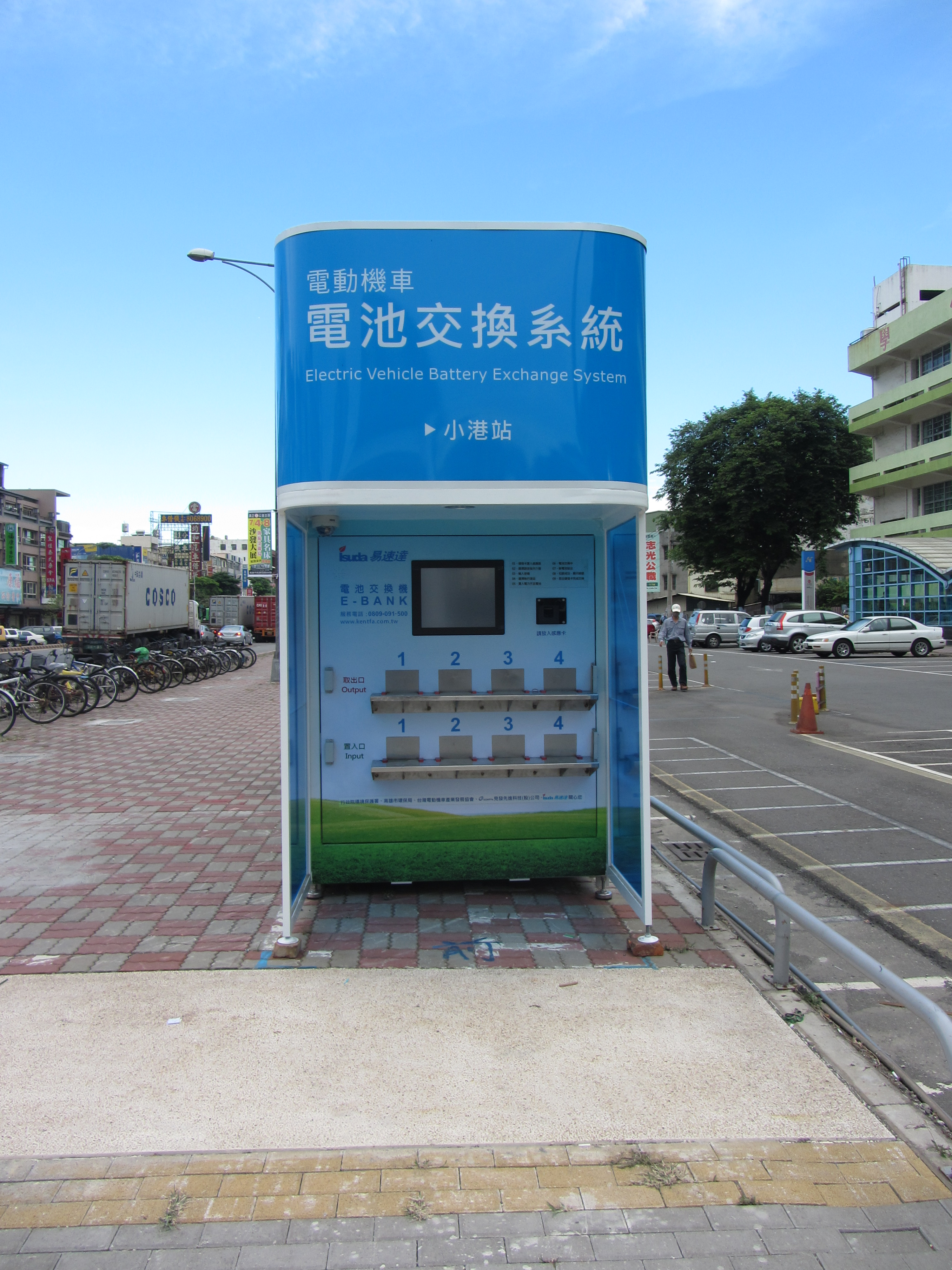 高雄市電動機車電池交換系統小港站，見發先進科技建置，位於高雄市小港區。